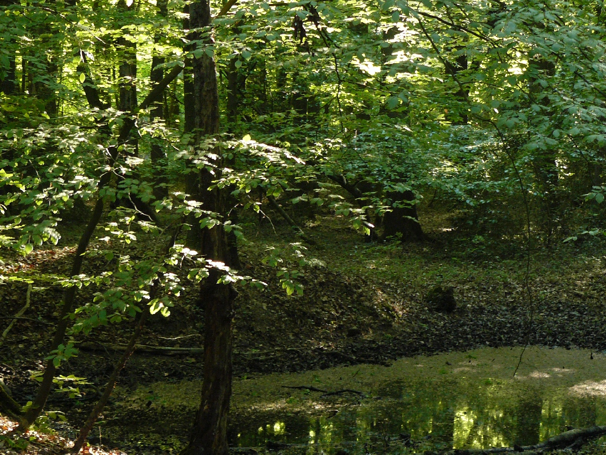 Naturschutzgebiet Braken (Naturwald) bei Harsefeld mit Wasserfläche